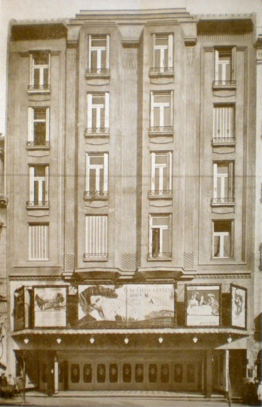 Edificio del Cine Cataluña, luego Cine Cosmos 70. Ubicado en Avenida Corrientes 2046. Arquitecto: Alberto E. Bourdon Año: 1929 Estilo: Art Decó. Buenos Aires, Argentina.